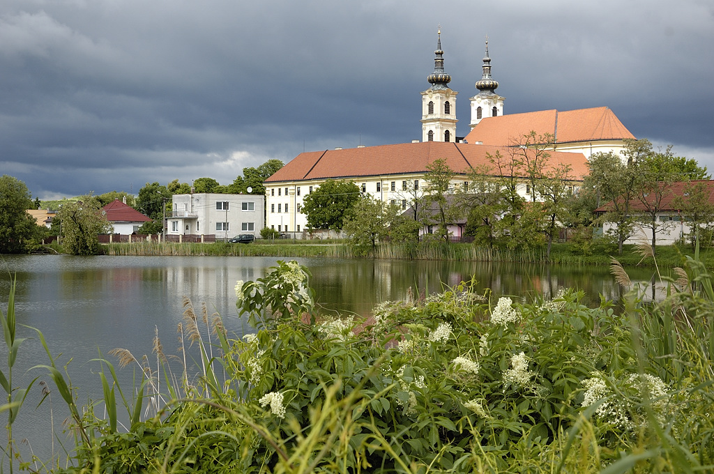 KLÁŠTOR PAULÍNOV+paulínsky